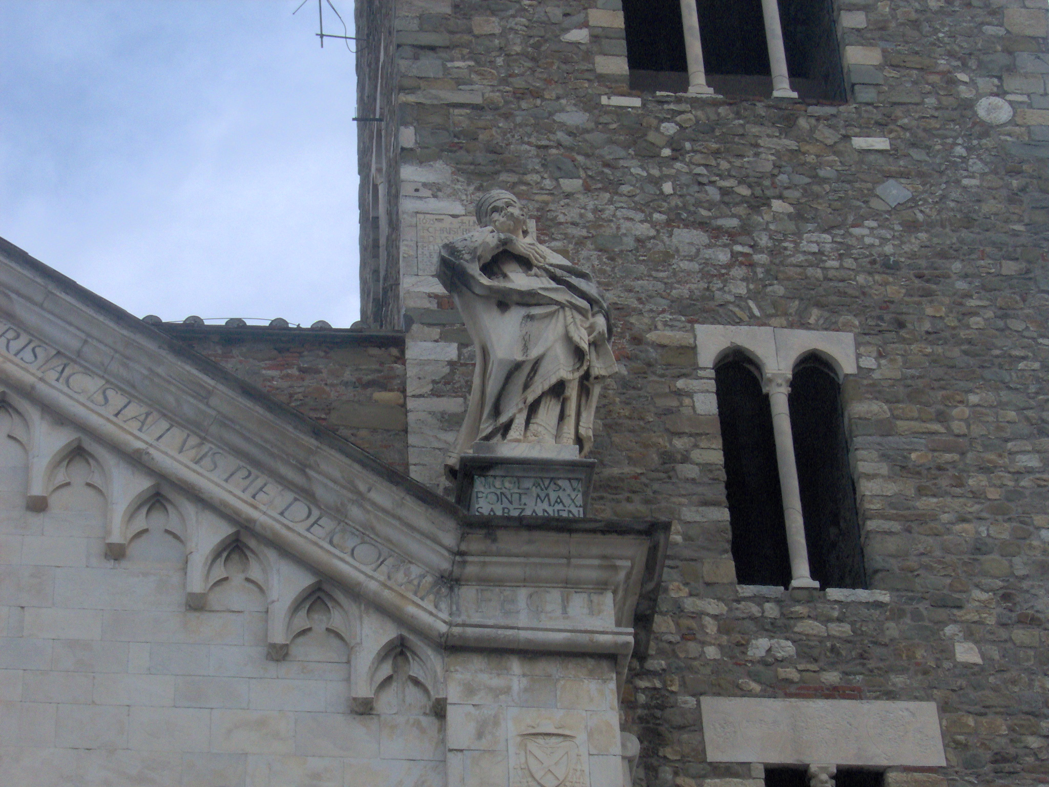 Statua di Niccolò V a Sarzana, sua città natale.